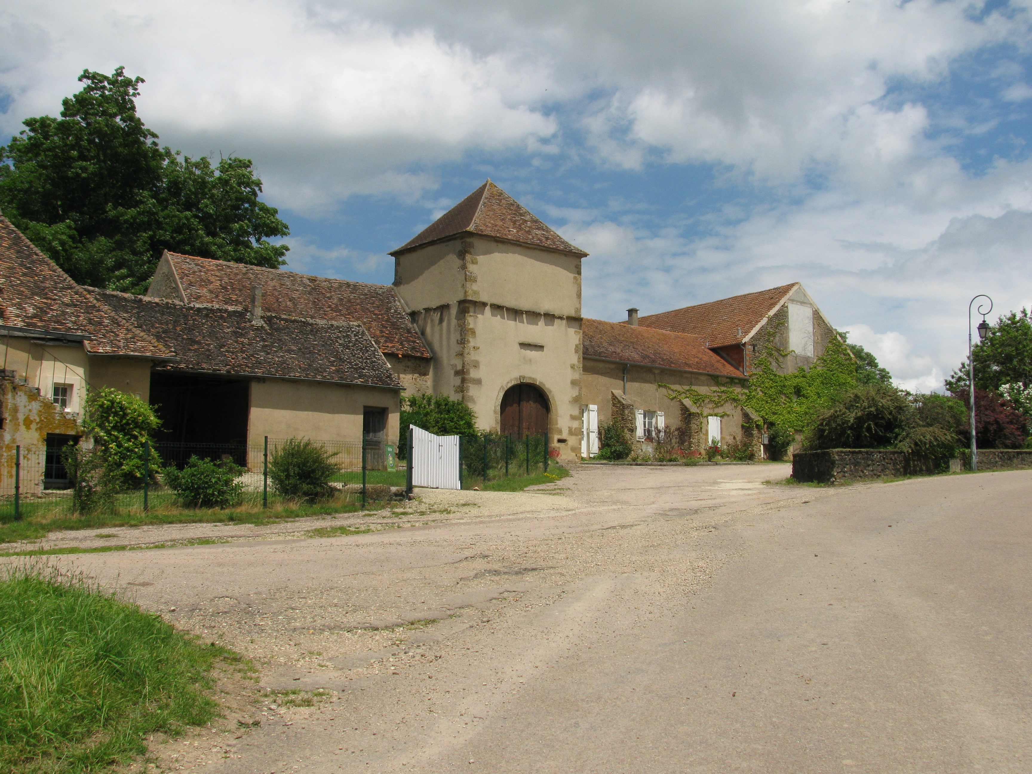 Le château de Domecy à Domecy-sur-Cure, Nièvre, France.